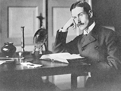 Portraetaufnahme von Thomas Mann 1905